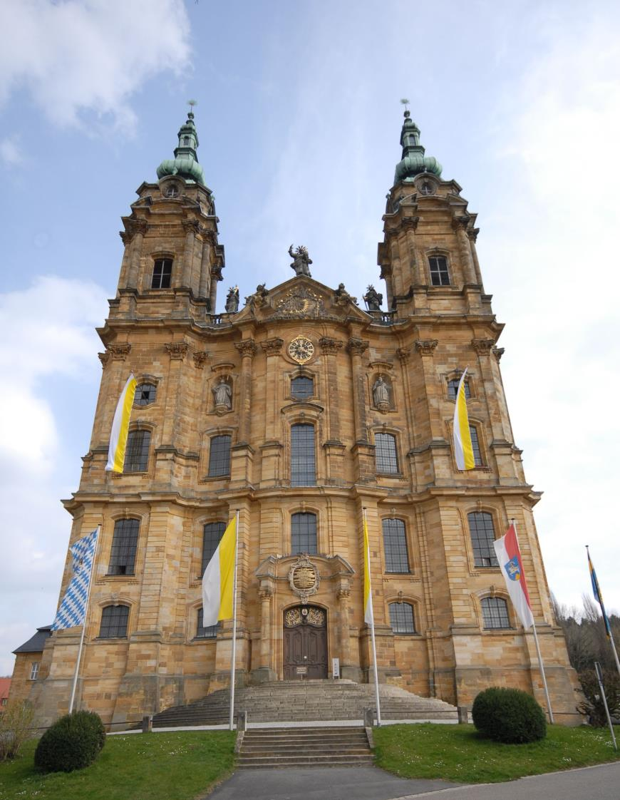 Vierzehnheiligen, Front